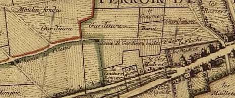 Plan du terroir de St Denis en France et des paroisses de la Chapelle, d'Aubervilliers, de la Cour-neuve, de Stains, de Pierrefitte, de Villetaneuse, d'Epinay, et St. Ouën / par P. Loriot. Centré sur le Chemin des Fillettes.